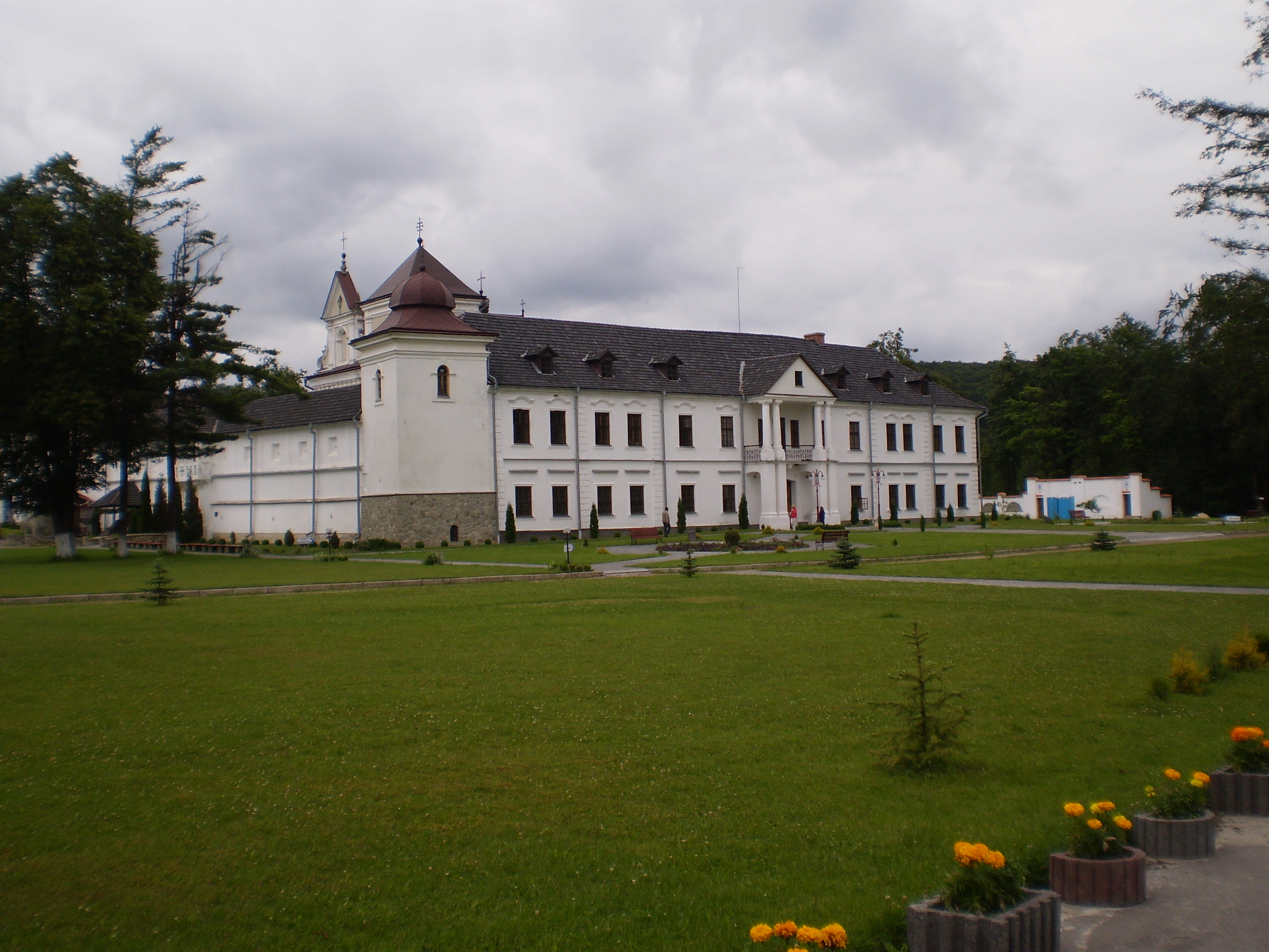 Унівський монастир-фортеця (мур.), с.Унів (Міжгір'я)